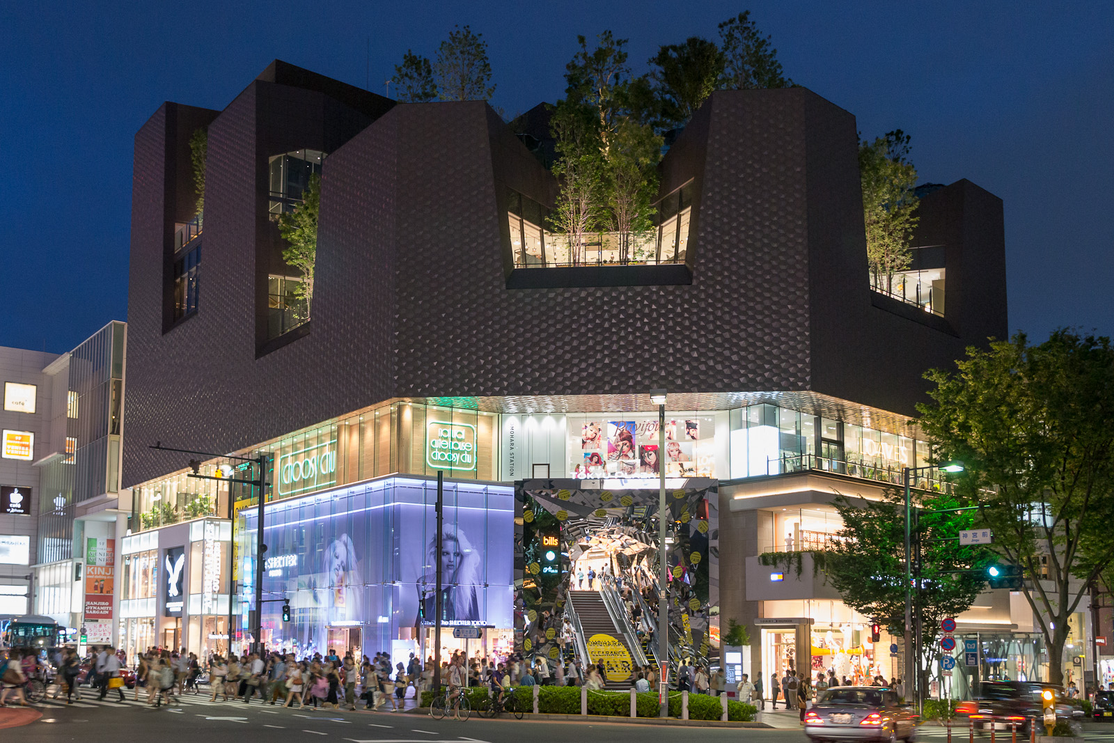 東急プラザ表参道の夜景。